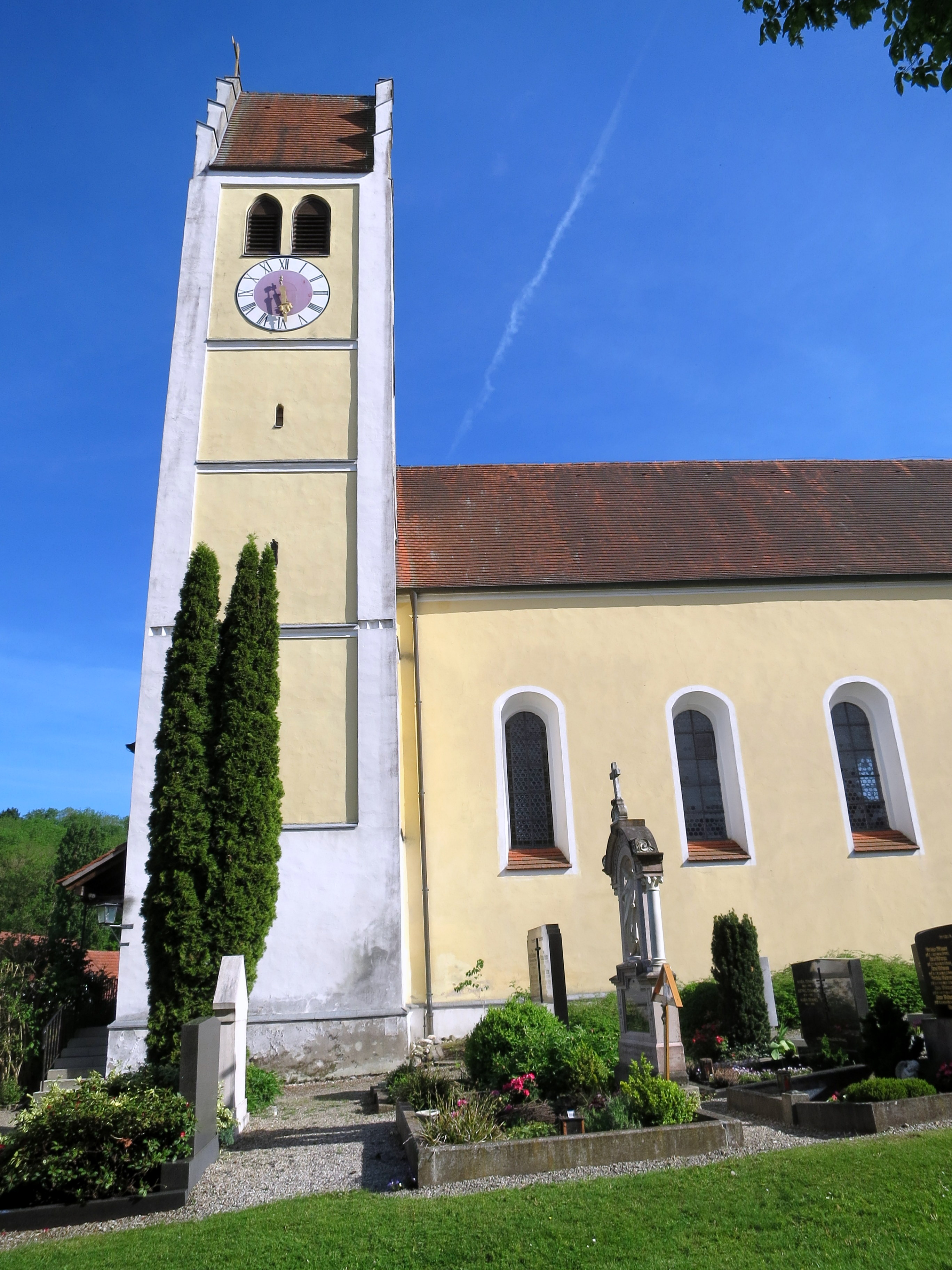 Katholische Pfarrkirche St. Vitus im OT Göbelsbach der Stadt Pfaffenhofen an der Ilm, Landkreis PAF.